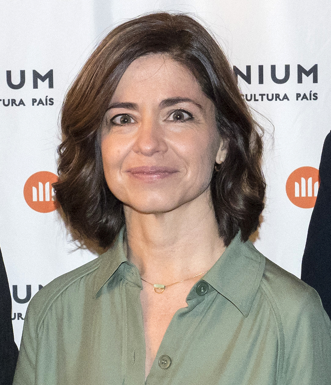 Premi Òmnium de Novel·la de l'Any 2018 La sabadellenca Marta Orriols és la guanyadora de la segona edició del Premi Òmnium Millor Novel·la de l'any amb l'obra 'Aprendre a parlar amb les plantes'. Es tracta del guardó més ben dotat econòmicament a obra publicada, amb 20.000 euros directes per a l'autor i 5.000 més per a promoció.